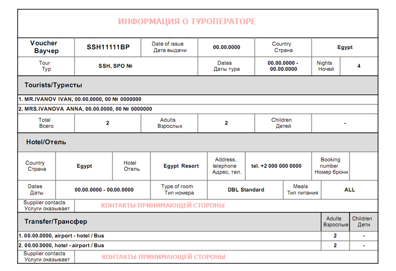 Форма туристического ваучера